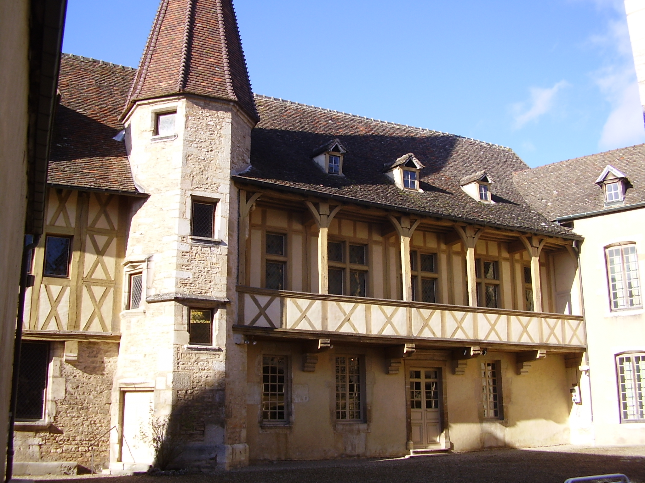 Musée du vin de Beaune (France) dans l'hôtel des ducs